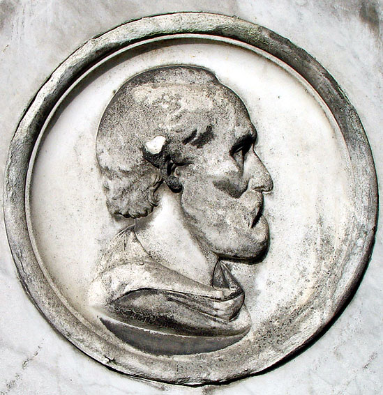 Hopfgarten bd